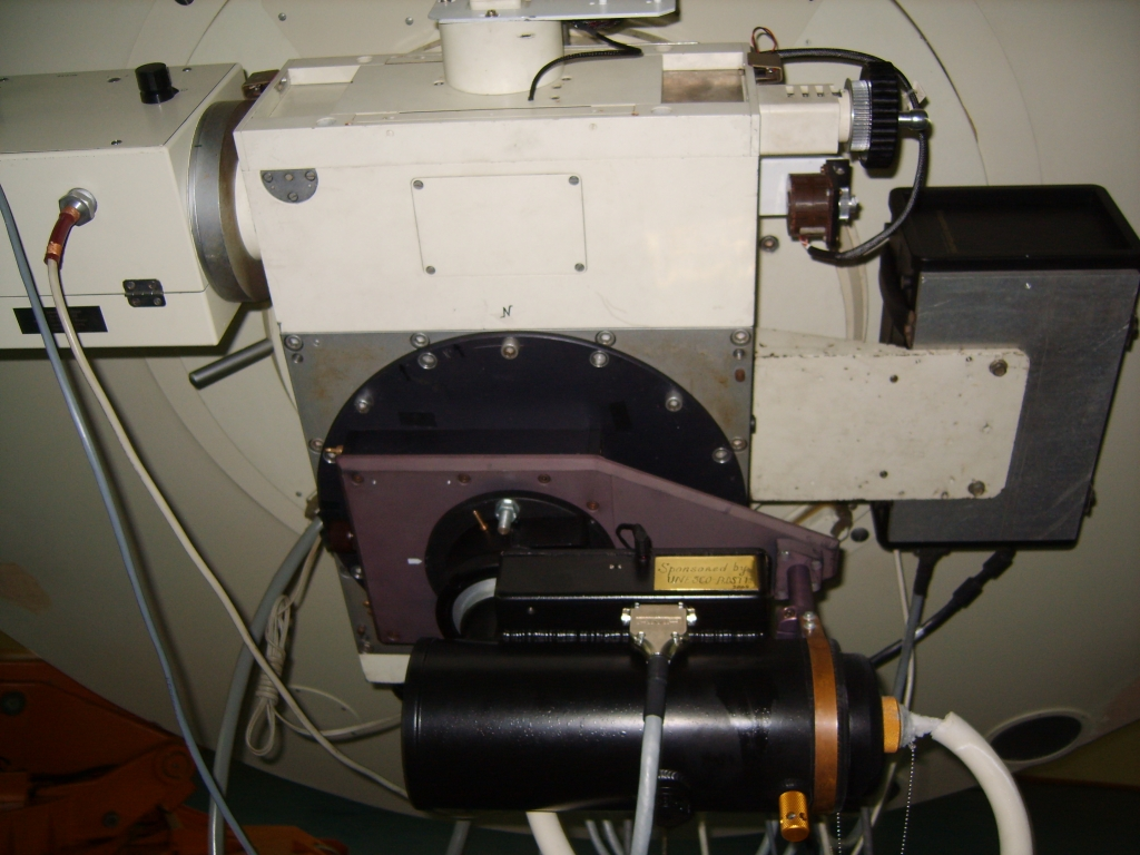 CCD камерата на двуметровия телескоп.